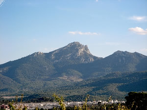 Pico del Maigmó, visto desde el norte